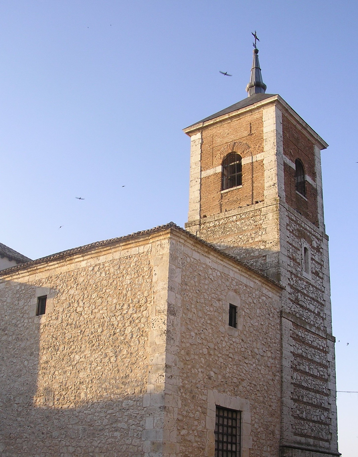 Hiszpania, Kastylia-La Mancha, Toledo, Stół Okani (Mesa de Ocańa), Noblejas, Kościół Świętego Jakuba